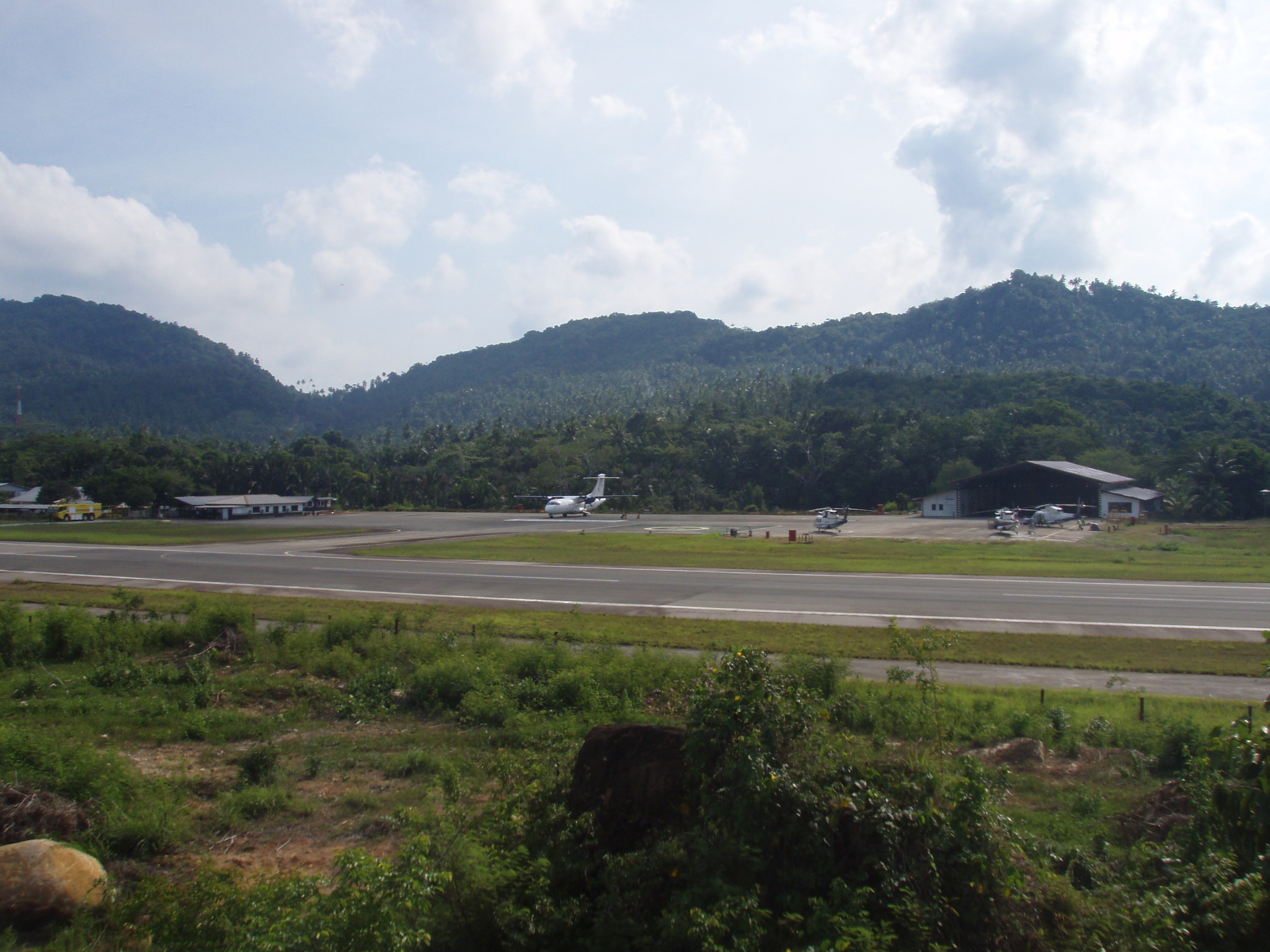 Bandara ConocoPhillips Matak Base